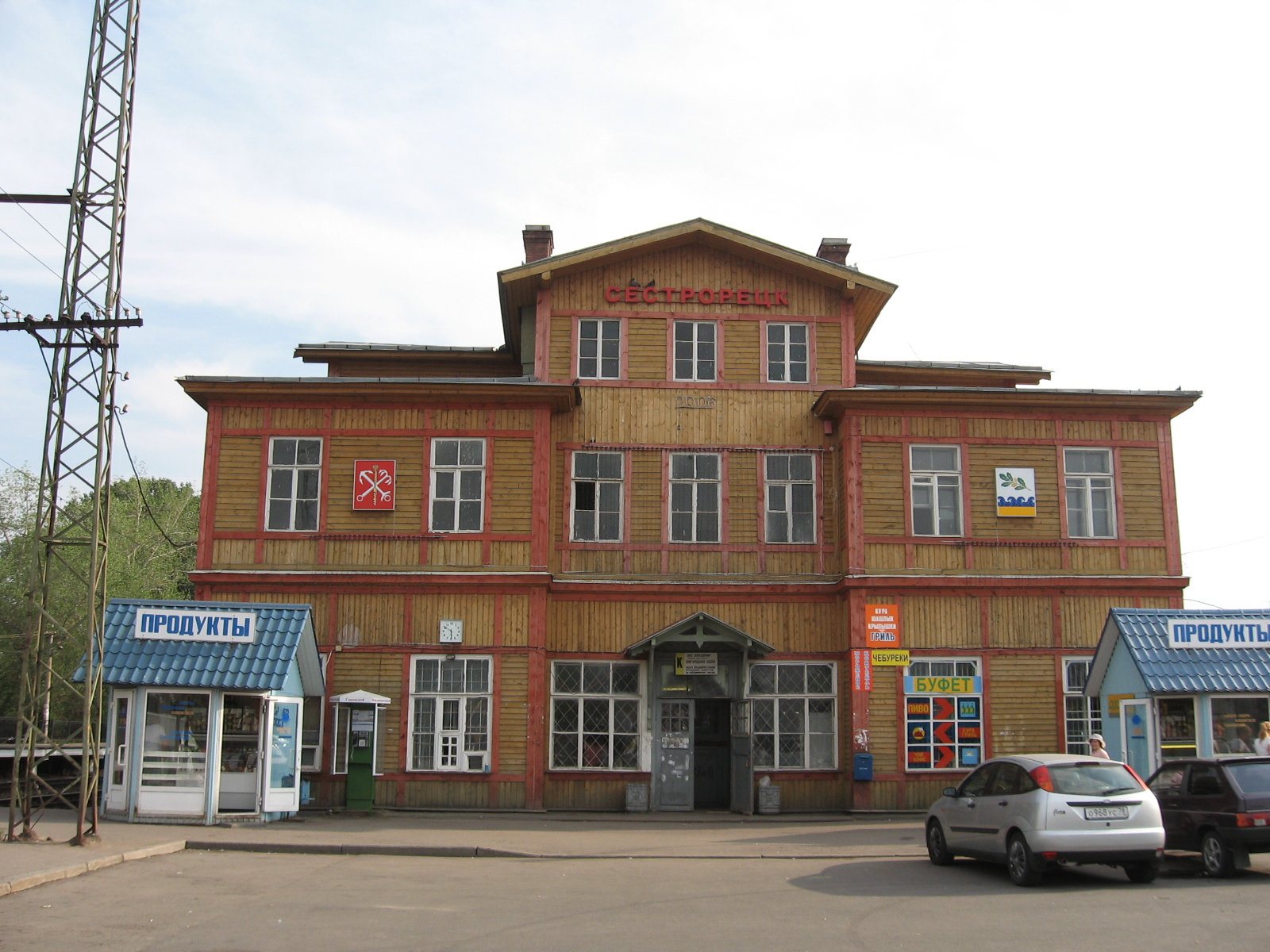 Sestroretsk station